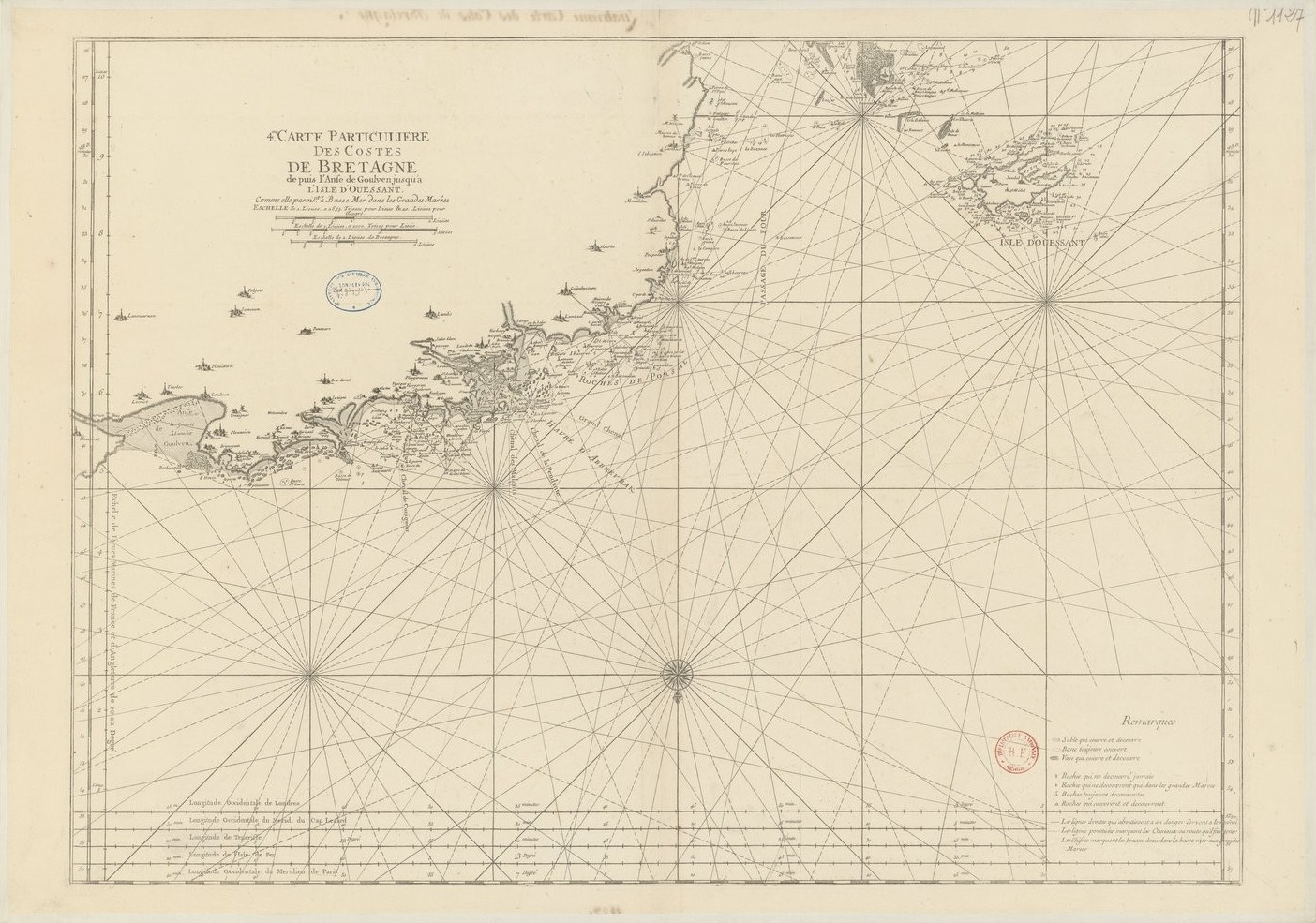 Carte particulière des côtes de Bretagne de l'Anse de Goulven à l'île d'Ouessant parue en 1693 dans la revue Neptune français : l'orientation de la carte n'est pas encore le nord en haut ; le Nord est représenté par la Fleur de Lys et l'Est par la Croix de Malte ; les rumbs issus des roses des vents donnent les secteurs de vents à utiliser pour rallier un point à terre